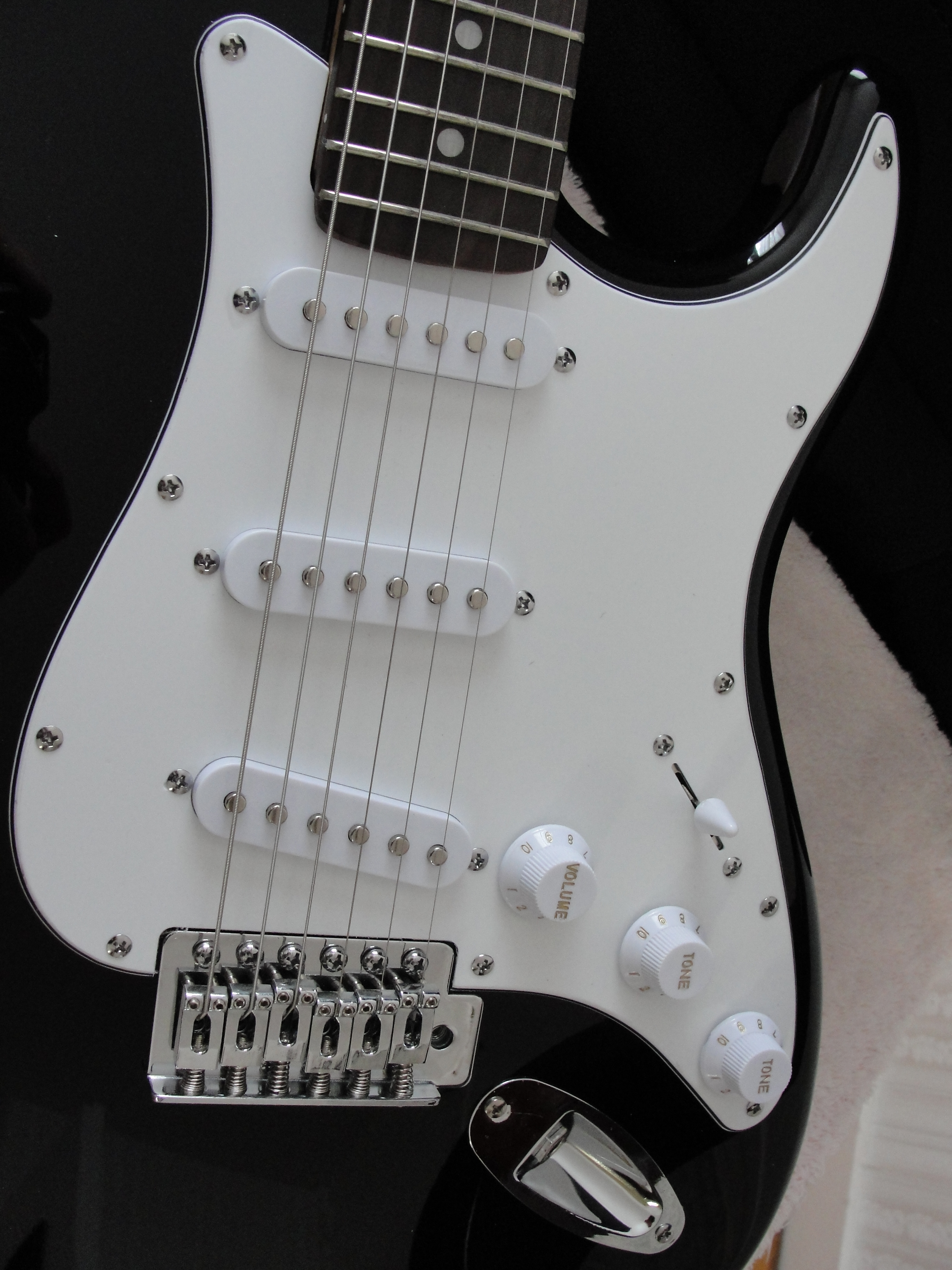 Gros plan guitare électrique C. Giant 570 (réplique Fender Stratocaster) -- diffusée par une société allemande sous forme de pack, sur le net ou certaines grandes surfaces, elle s'affiche à un tarif ultra compétitif: seule à une cinquantaine d'euros, le double avec ampli, housse, sangle, jeu de médiators etc.